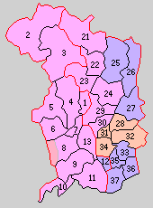 後の兵庫県揖保郡域の町村制時点の町村。